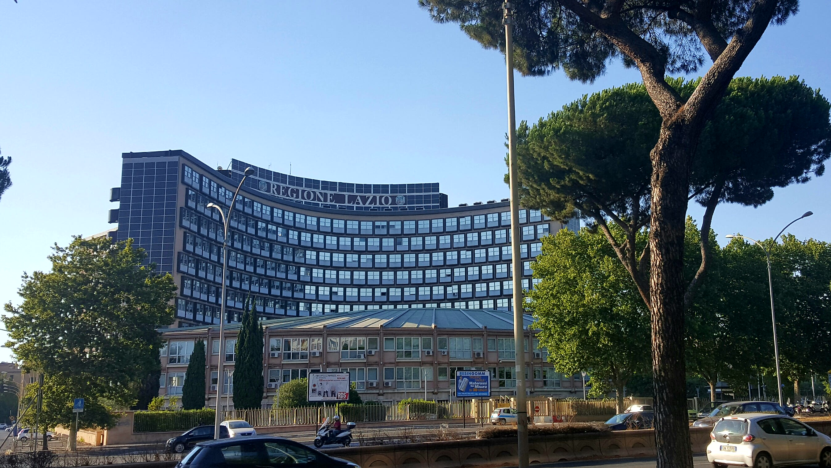 Sede della Regione Lazio, a Roma in via R. Raimondi Garibaldi, 7